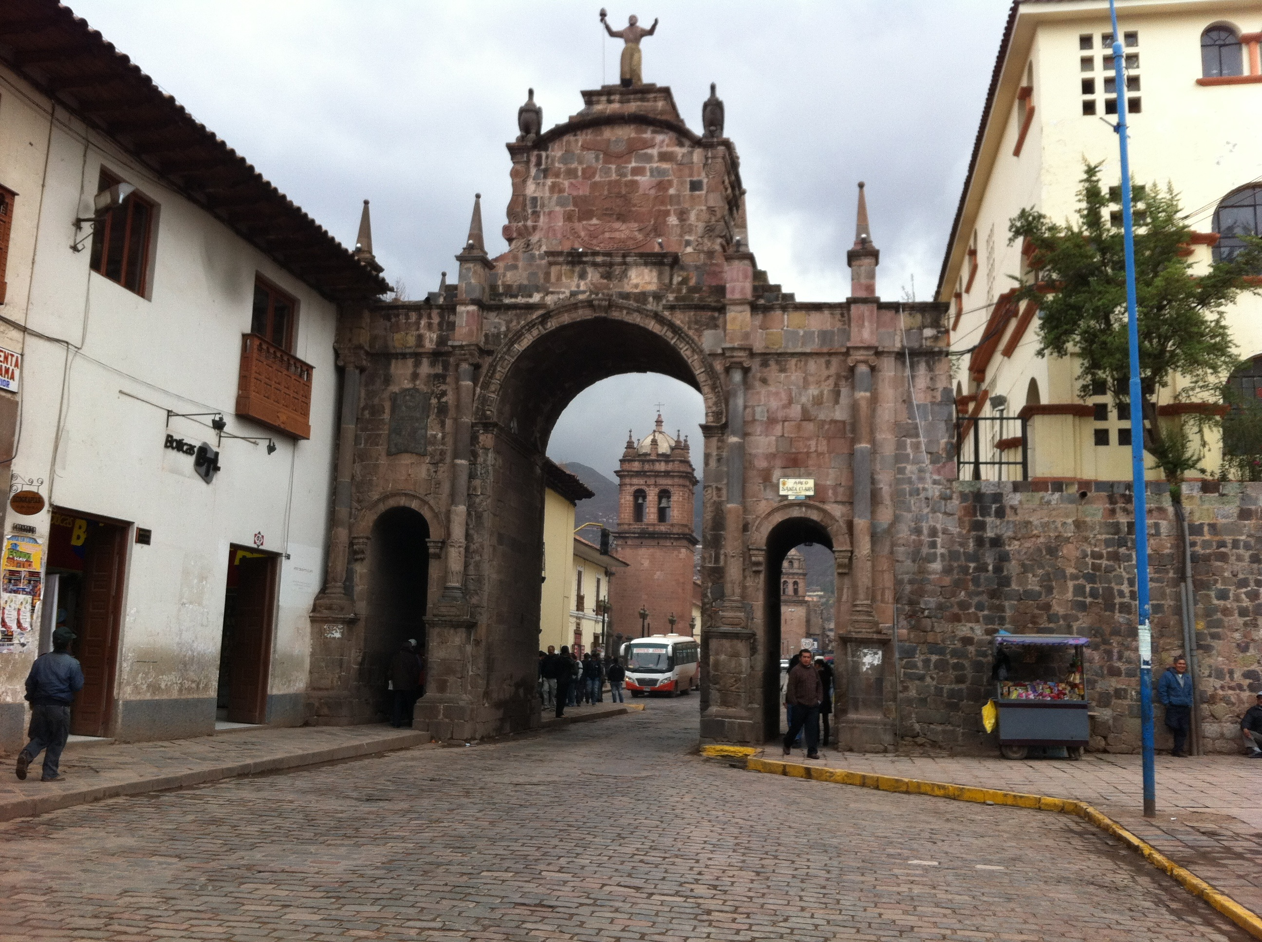 Arco de Santa Clara